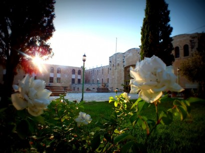 երուսաղեմի ժառանգավորաց վարժարան